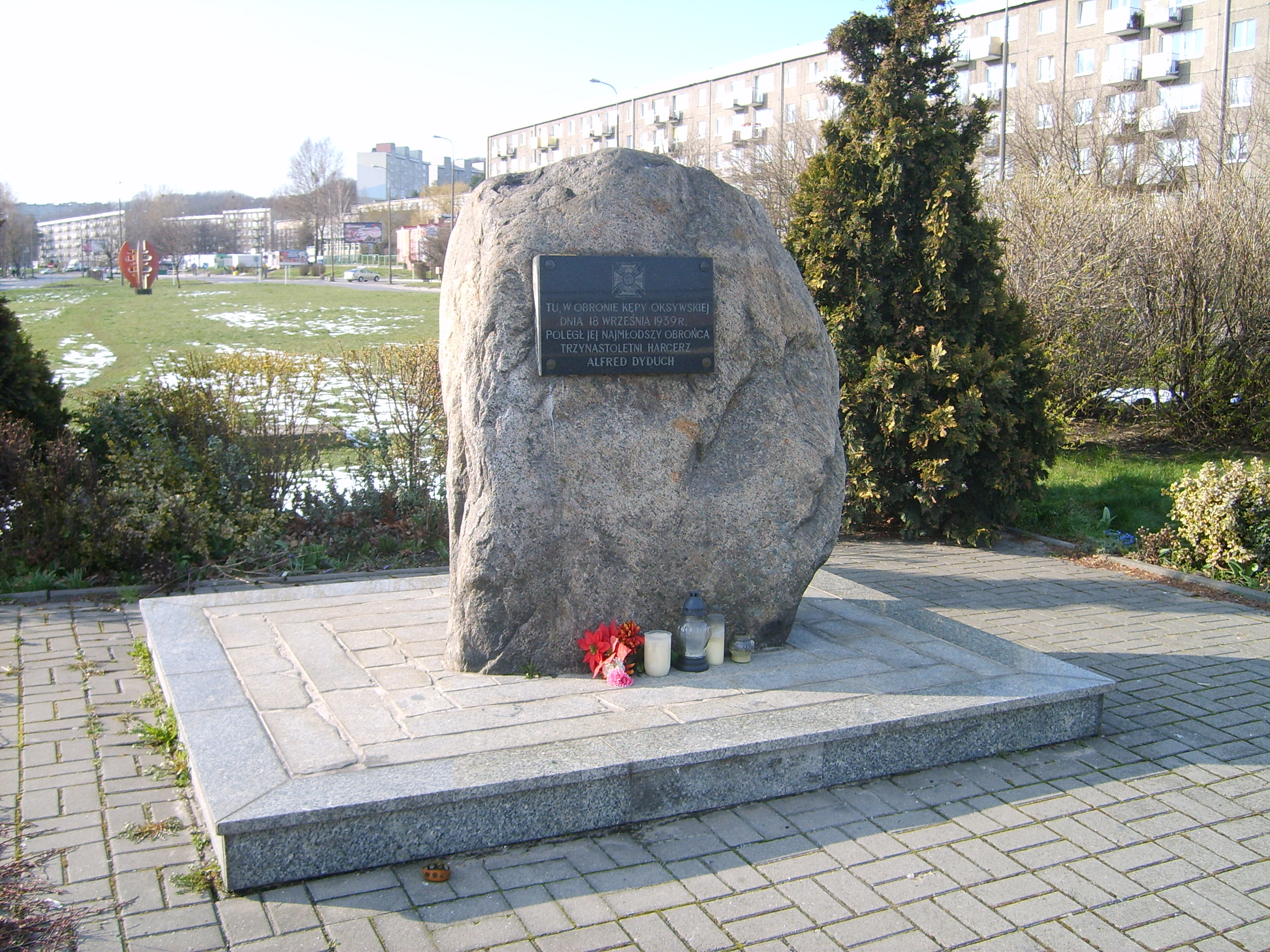 Gdynia Obłuże, pomnik Alfreda Dyducha